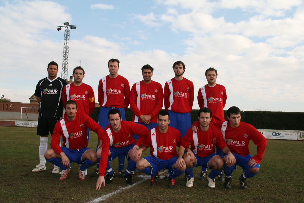 CD Alfindén